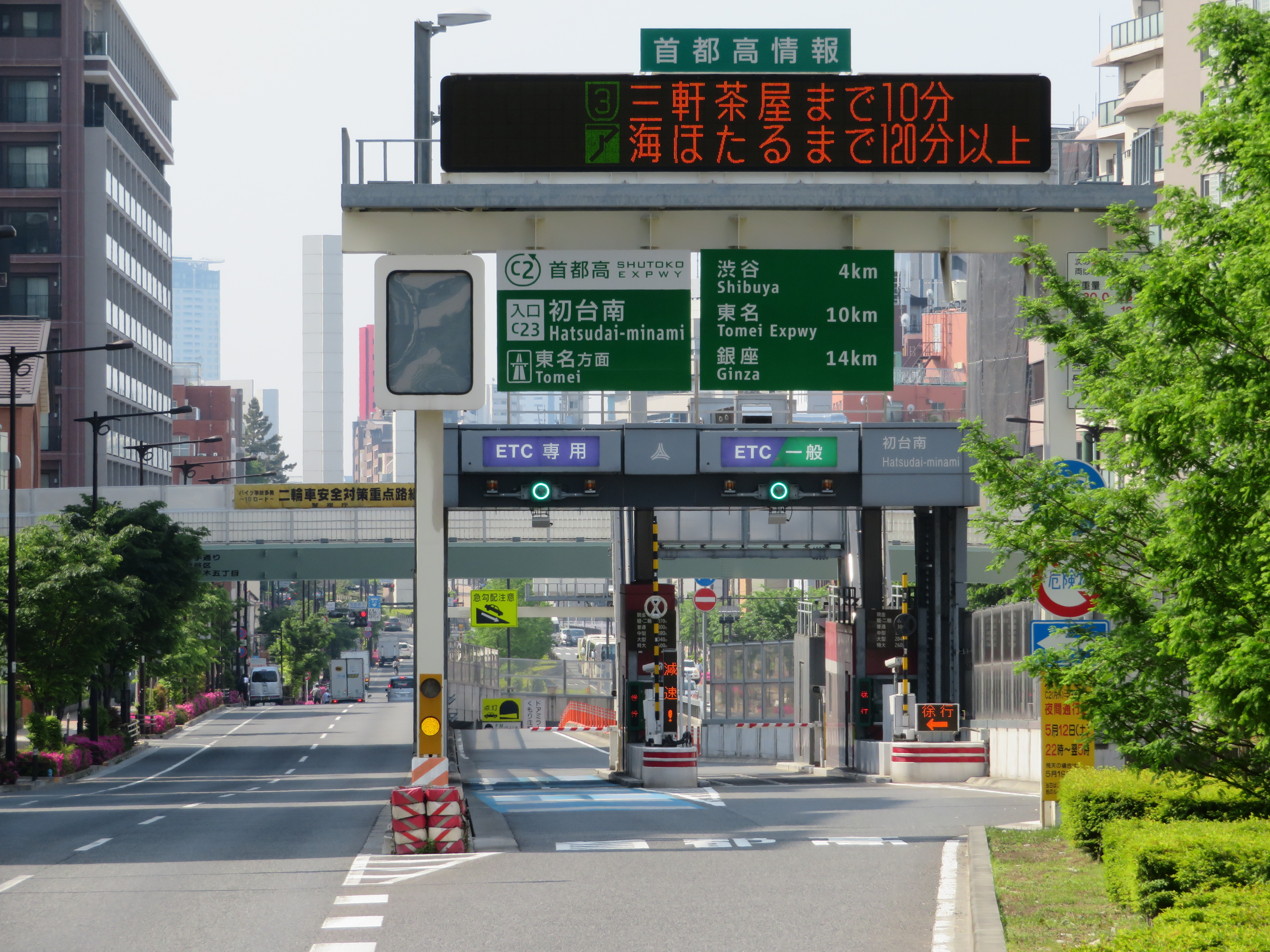 首都高速道路中央環状線 初台南入口料金所付近 Canon PowerShot SX720 HS